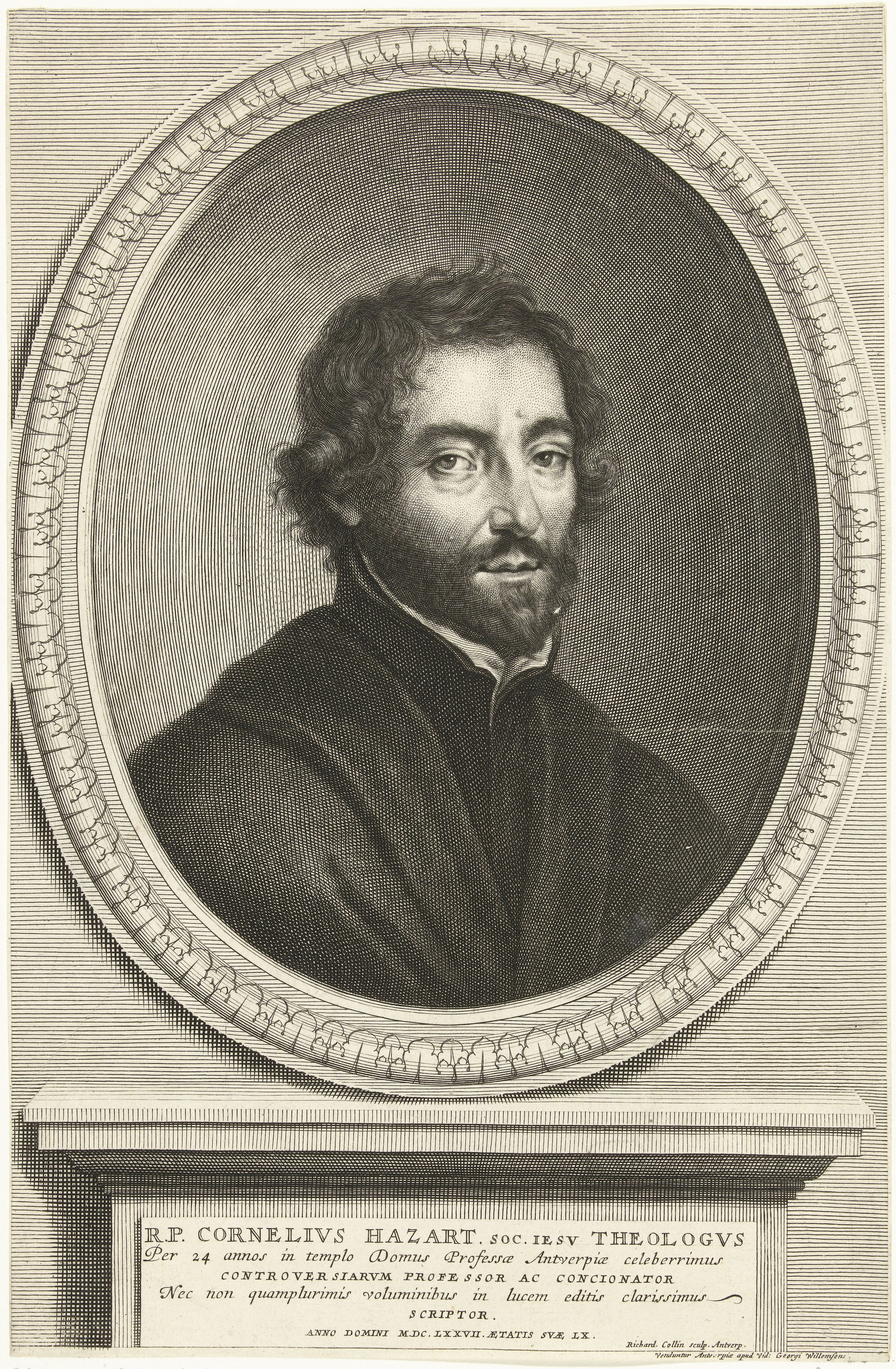 IdentificatieTitel(s): Portret van Cornelius HazartObjecttype: prent Objectnummer: RP-P-BI-6129XX1Catalogusreferentie: Hollstein Dutch 9Omschrijving: Borstbeeld van de jezuïet Cornelius Hazart, in ovaal. Onder het portret zijn naam en levensdata in het Nederlands.VervaardigingVervaardiger: prentmaker: Richard Collin (vermeld op object)uitgever: weduwe Joris Willemsens (vermeld op object)Plaats vervaardiging: AntwerpenDatering: ca. 1677 - ca. 1700Fysieke kenmerken: gravureMateriaal: papier Techniek: graveren (drukprocedé)Afmetingen: blad: h 295 mm × b 193 mmOnderwerpWie: Cornelius HazartVerwerving en rechtenVerwerving: onbekendCopyright: Publiek domein